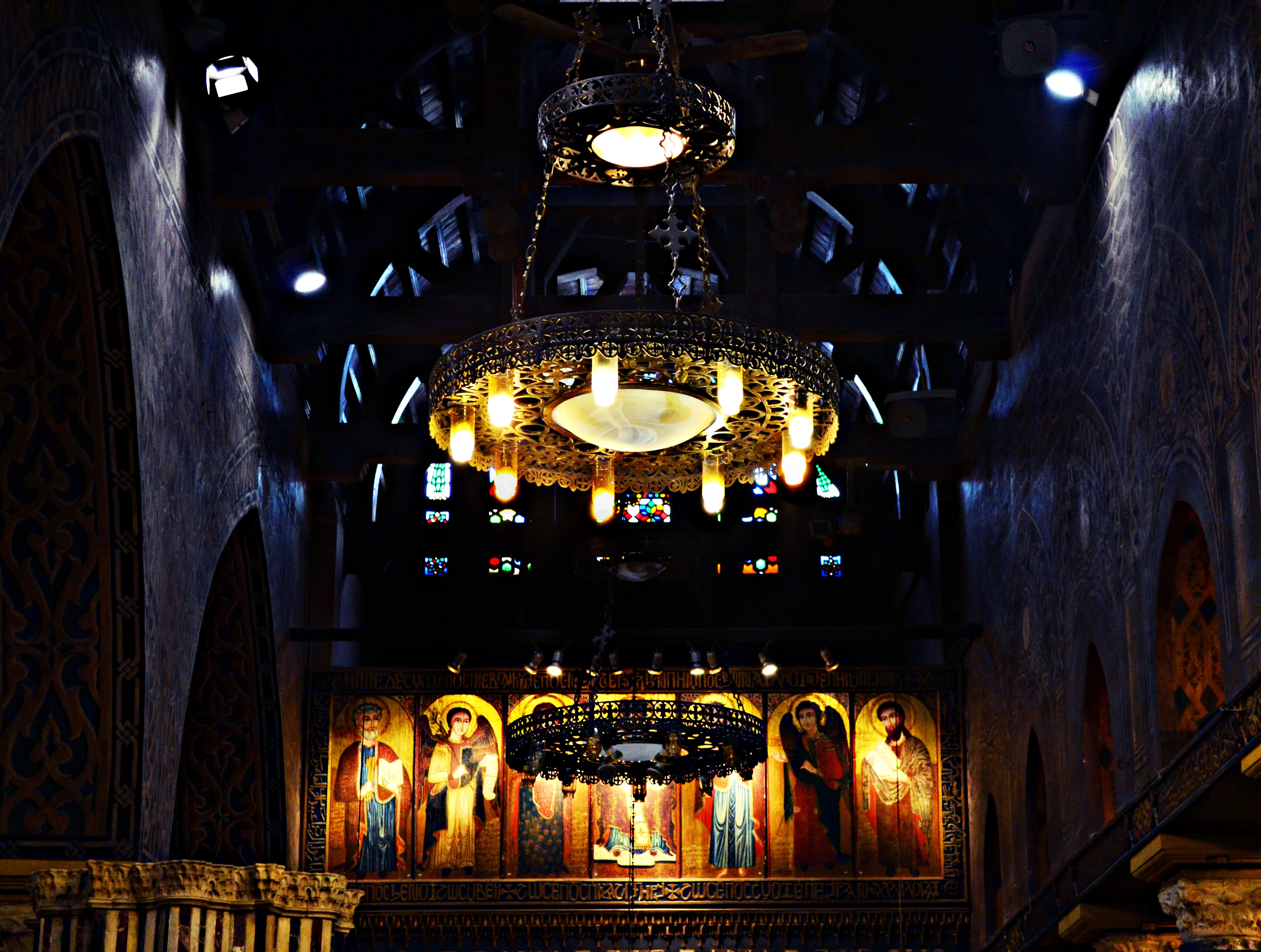 أعلى حجاب الهيكل بالكنيسة المعلقة بمصر القديمة، القاهرة